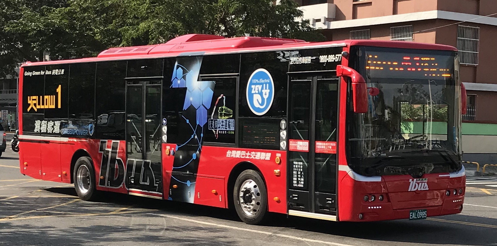 電動金旅EAL-0985